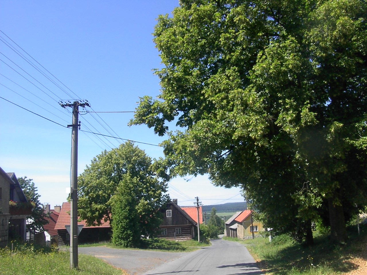 Main street in kařízek